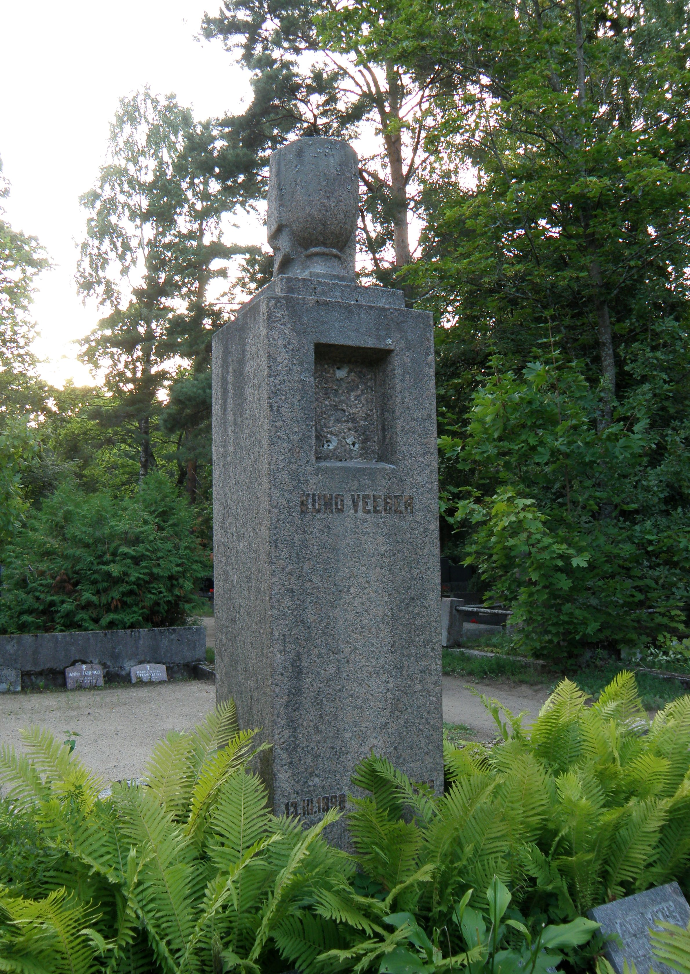 Kuno Veeberi hauamonument